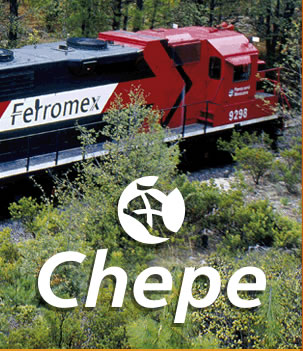 Locomotive ferromex avec le sigle du Chepe représentant une sandale, allusion aux courses à pied effectuées par les indiens Raramuris.